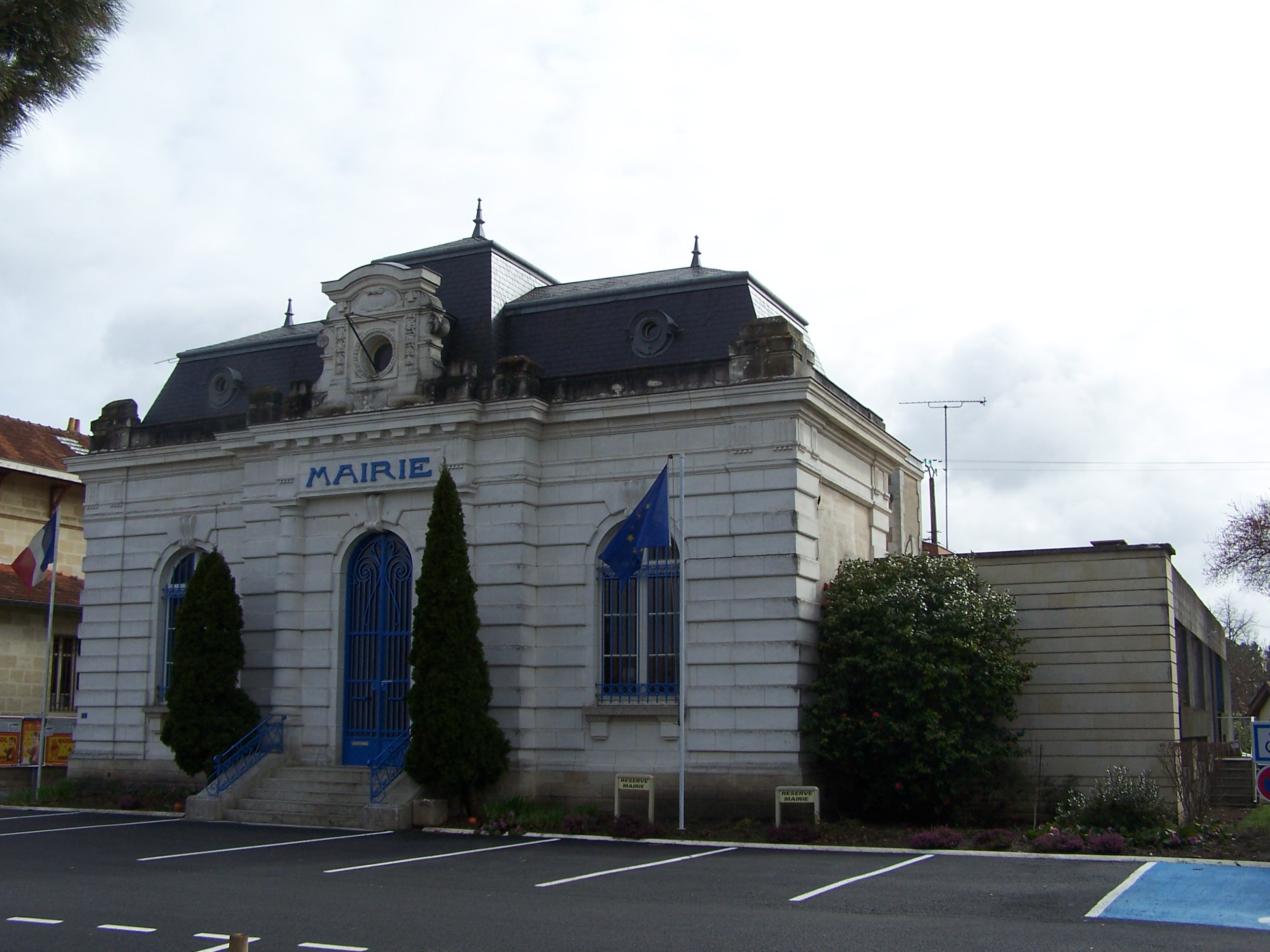 Mairie du Porge, Gironde, France